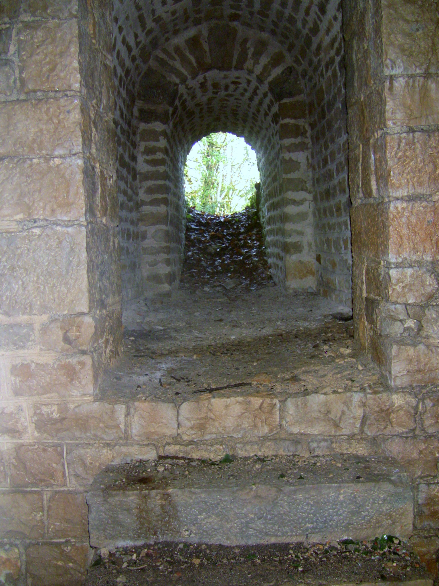 Le petit abris (vu de l'intérieur) du massif de terre de la batterie annexe sud-ouest du fort de Planoise, à Besançon (Doubs, France).